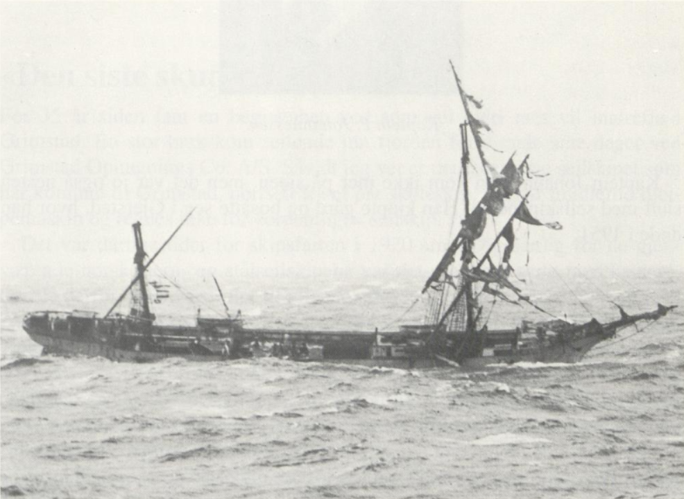 Vraket av Skaregrøm fotografert fra den italienske linjedamperen Roma